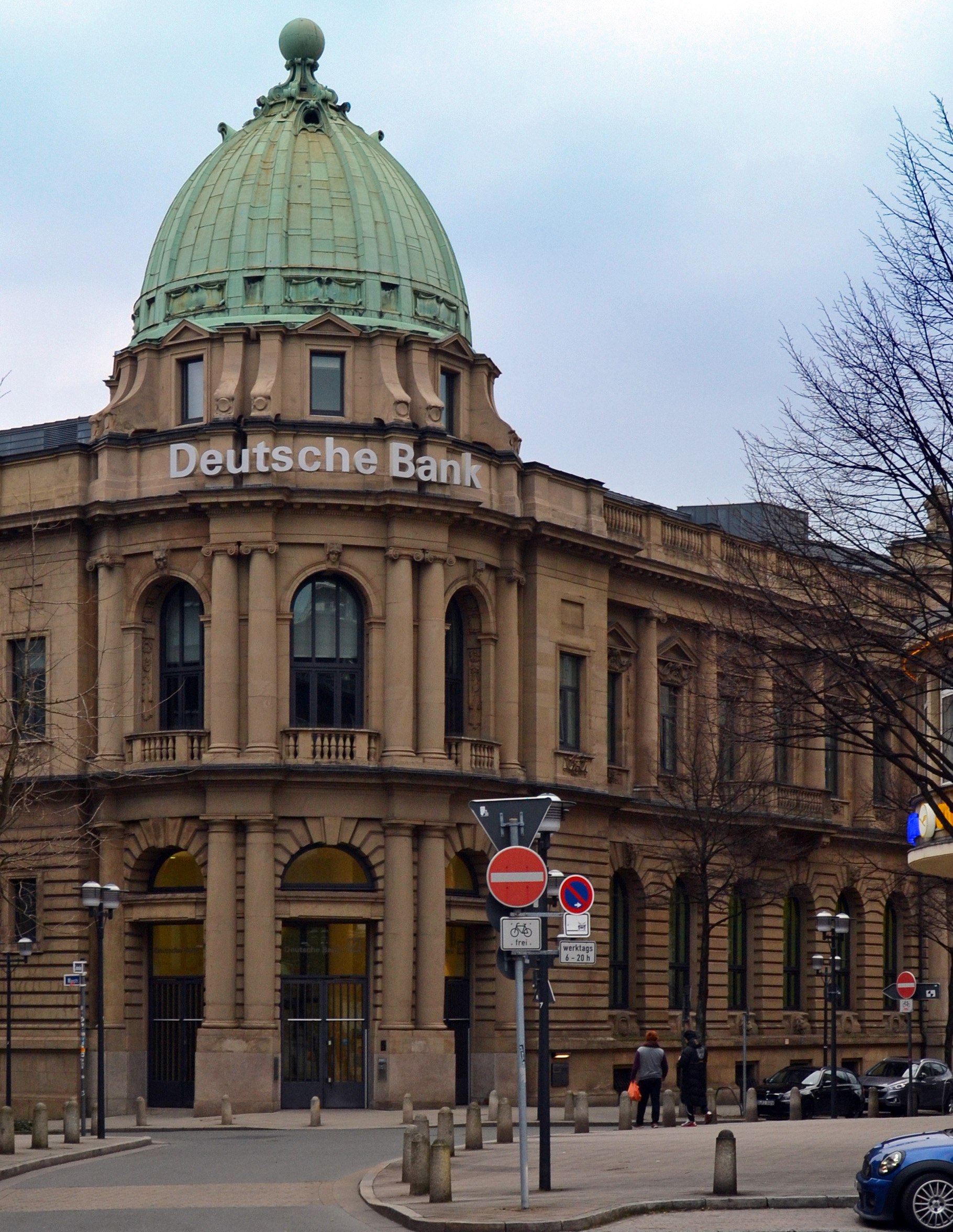 Bankenviertel Essen, Gebäude der ehem. Essener Creditanstalt, heute Deutsche Bank